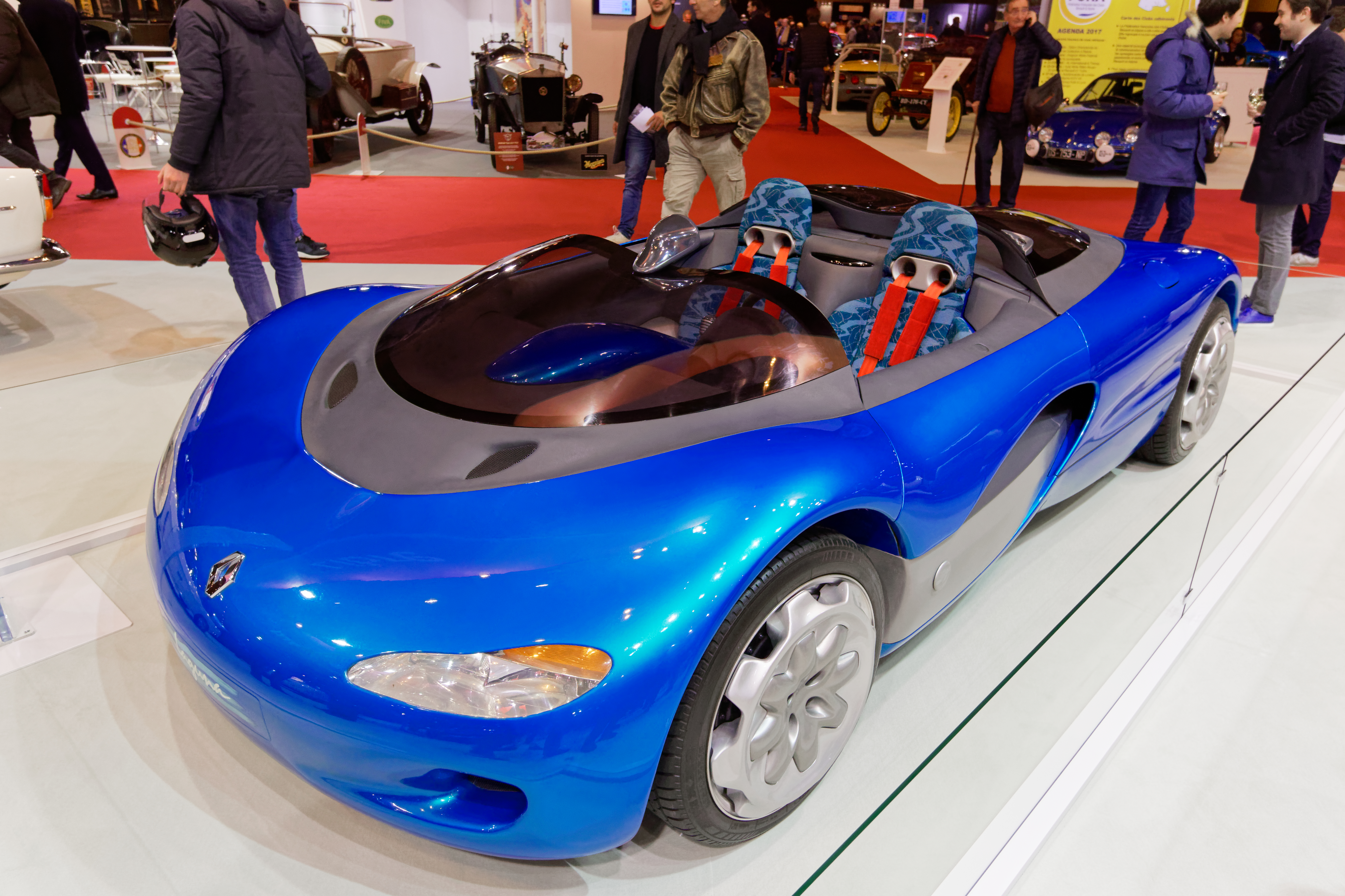 Une Renault concept-car Laguna de 1990 exposée lors du salon Rétromobile 2017.